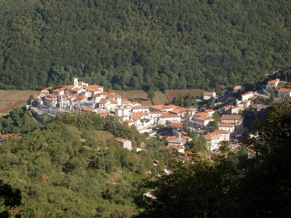 Panorama Viticuso